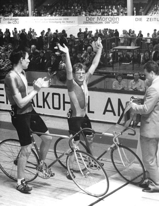 Erik Zabel, Frank Seeland ADN-ZB Roeske 5.1.89 Berlin: Winterbahn-Frank Seeland neuer Titelträger im Punktefahren - Die DDR-Hallenmeisterschaft im 50-km-Punktefahren gewann am 4.1.89 auf der Berliner Winterbahn der Geraer Frank Seeland (rechts). Während der Siegerehrung spenden die Zuschauer und der Zweitplazierte Erik Zabel (TSC Berlin-l.) den verdienten Beifall.